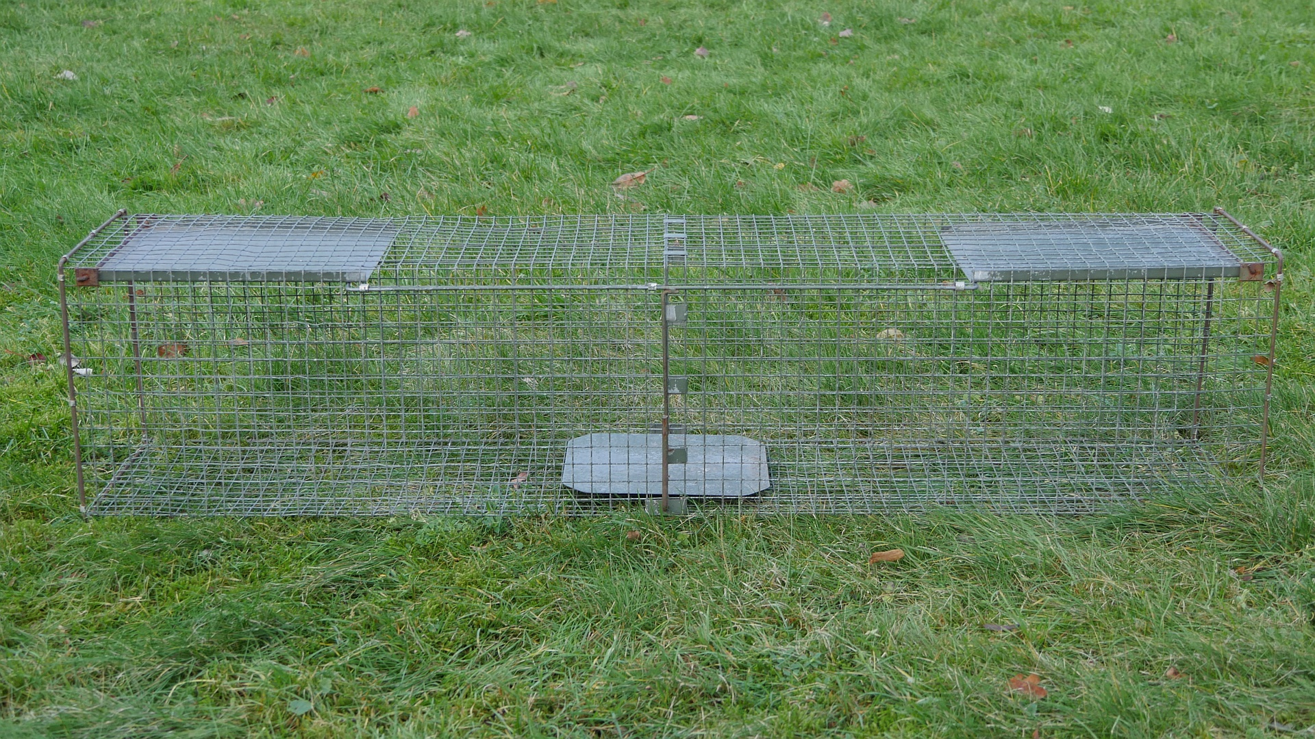 Kastenfalle (Wippbrettfalle), geöffnet